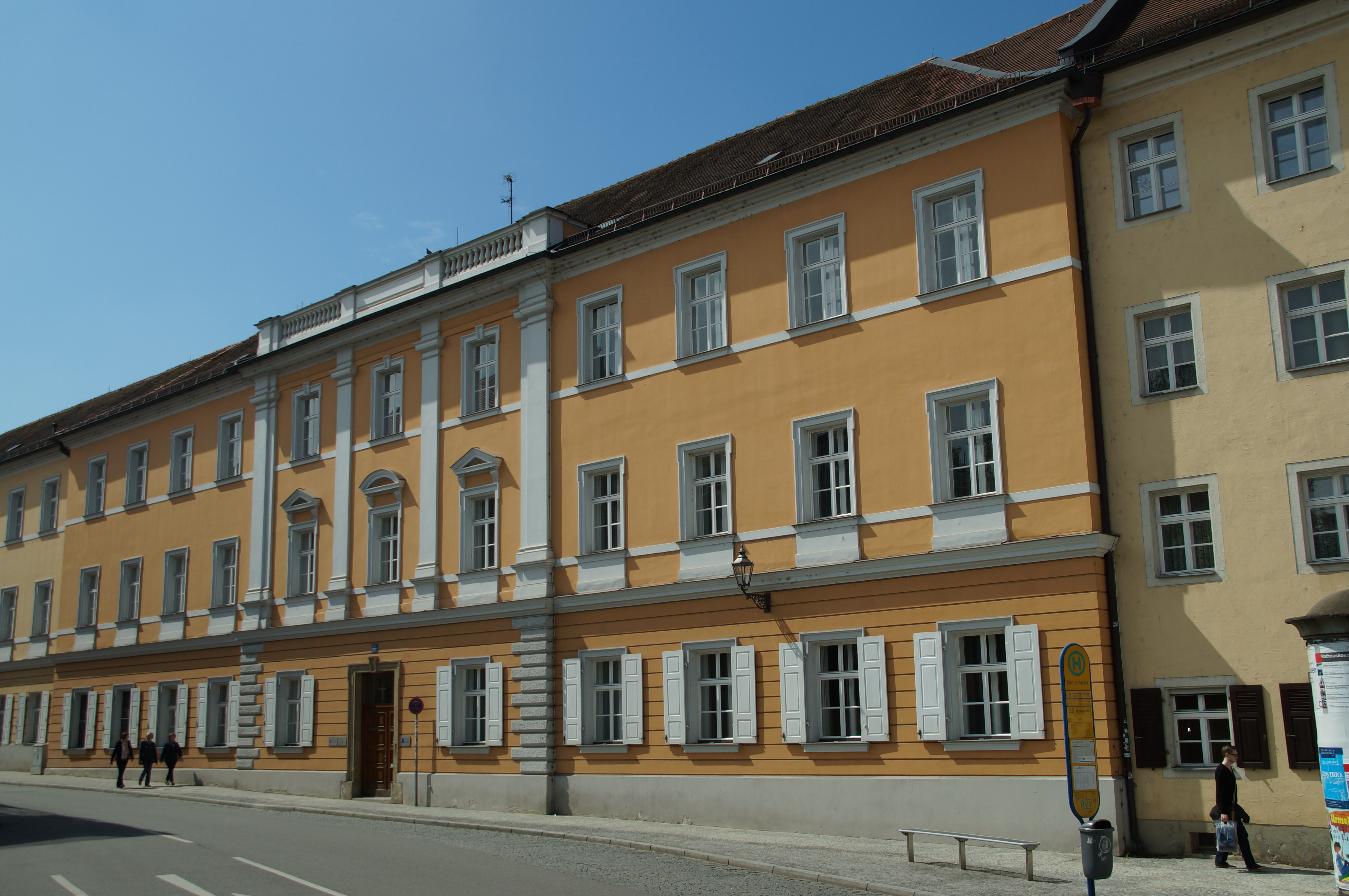 Klerikalseminar St. Jakob, dreigeschossige Mehrflügelanlage mit Walmdächern, um Kreuzgang des Schottenklosters, letztes Viertel 12. Jahrhundert, Flügelbauten mit neubarocken Fassadengliederungen, ab 1866 unter Verwendung älterer Substanz This is a photograph of an architectural monument.